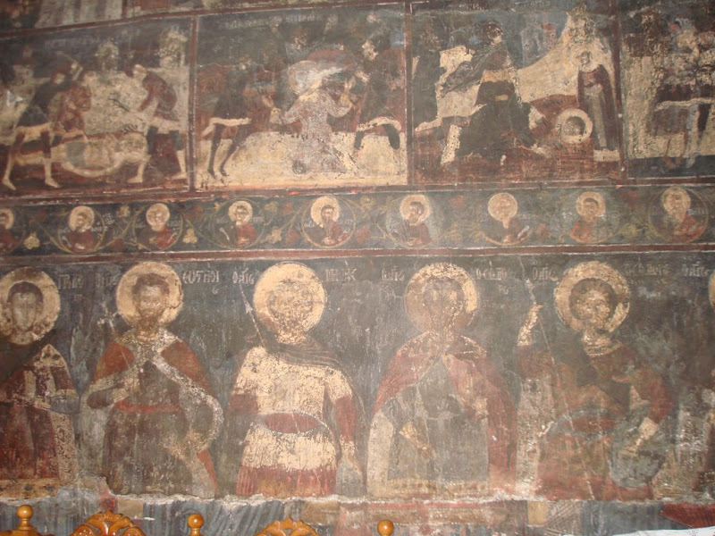 Фреска в църквата "Свети Георги" в Катакали, Гревенско, Гърция.